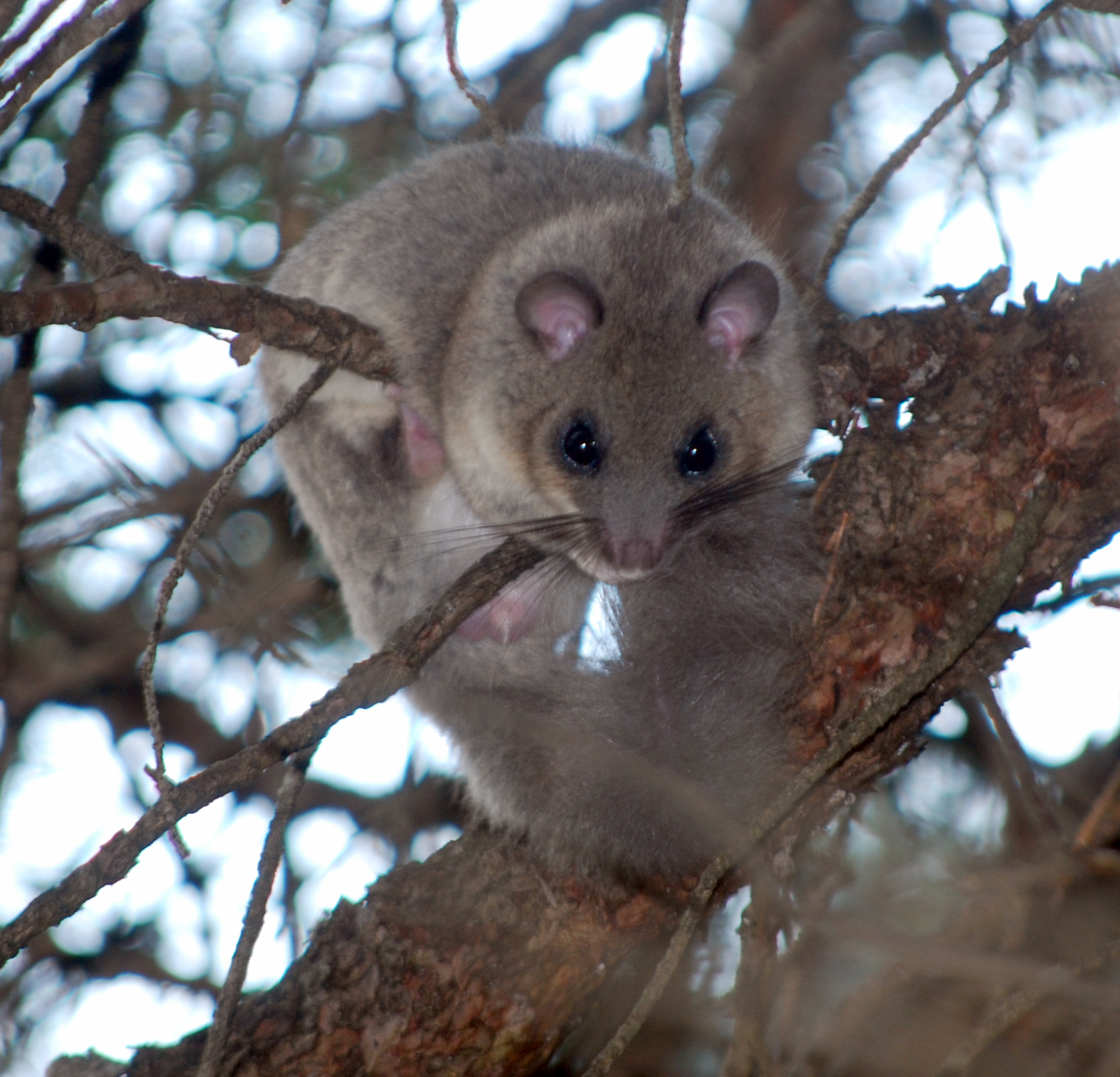 Siebenschläfer im Geäst